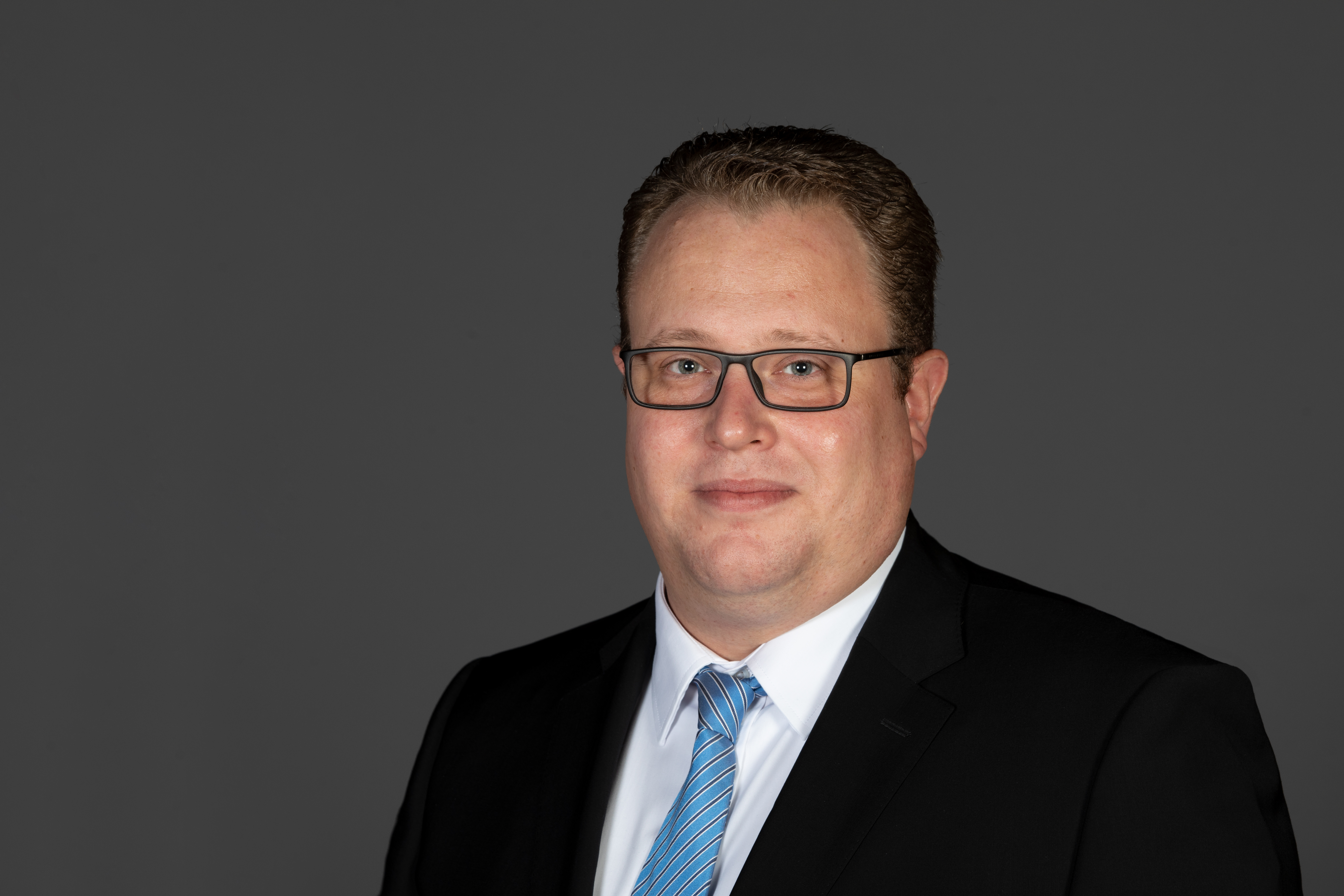 Dennis Gladiator (CDU)